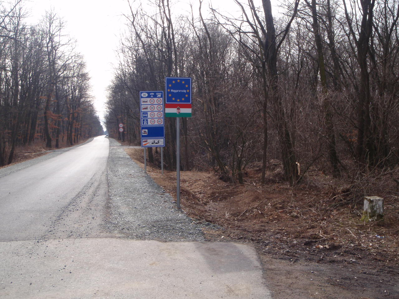 Und-Füles közötti út határmetszése